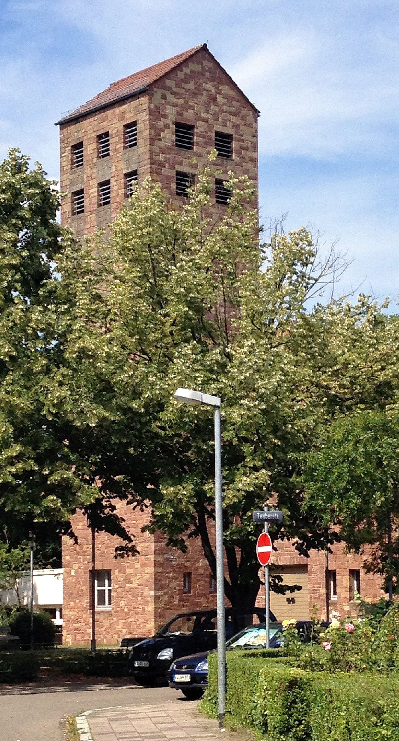 Ansicht von Schauinslandstraße